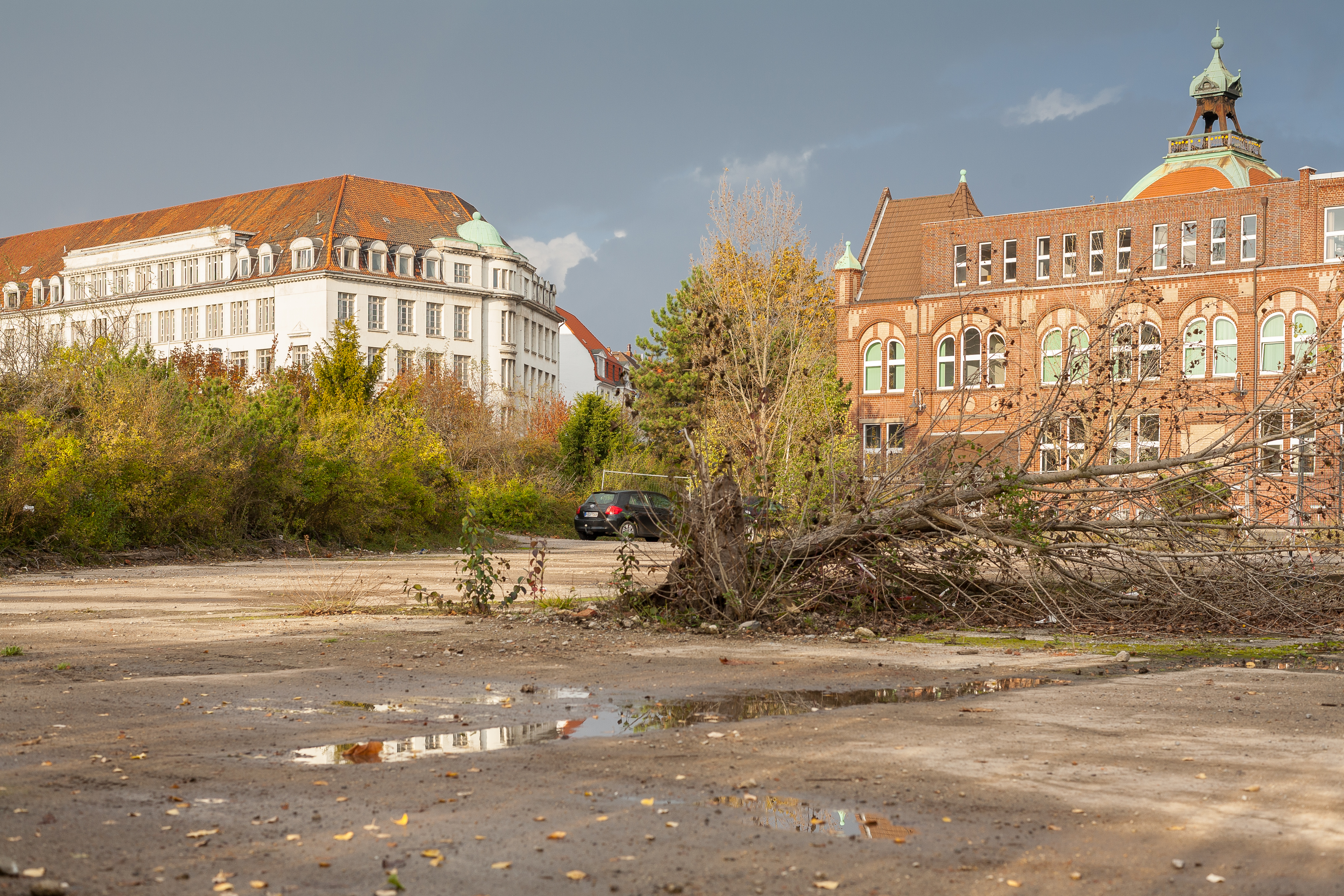 Parkplatz auf der Grundfläche einer abgerissenen Fabrikhalle der Hanomag. Der Parkplatz befindet sich an der Hanomagstraße 11 in Hannover-Linden.